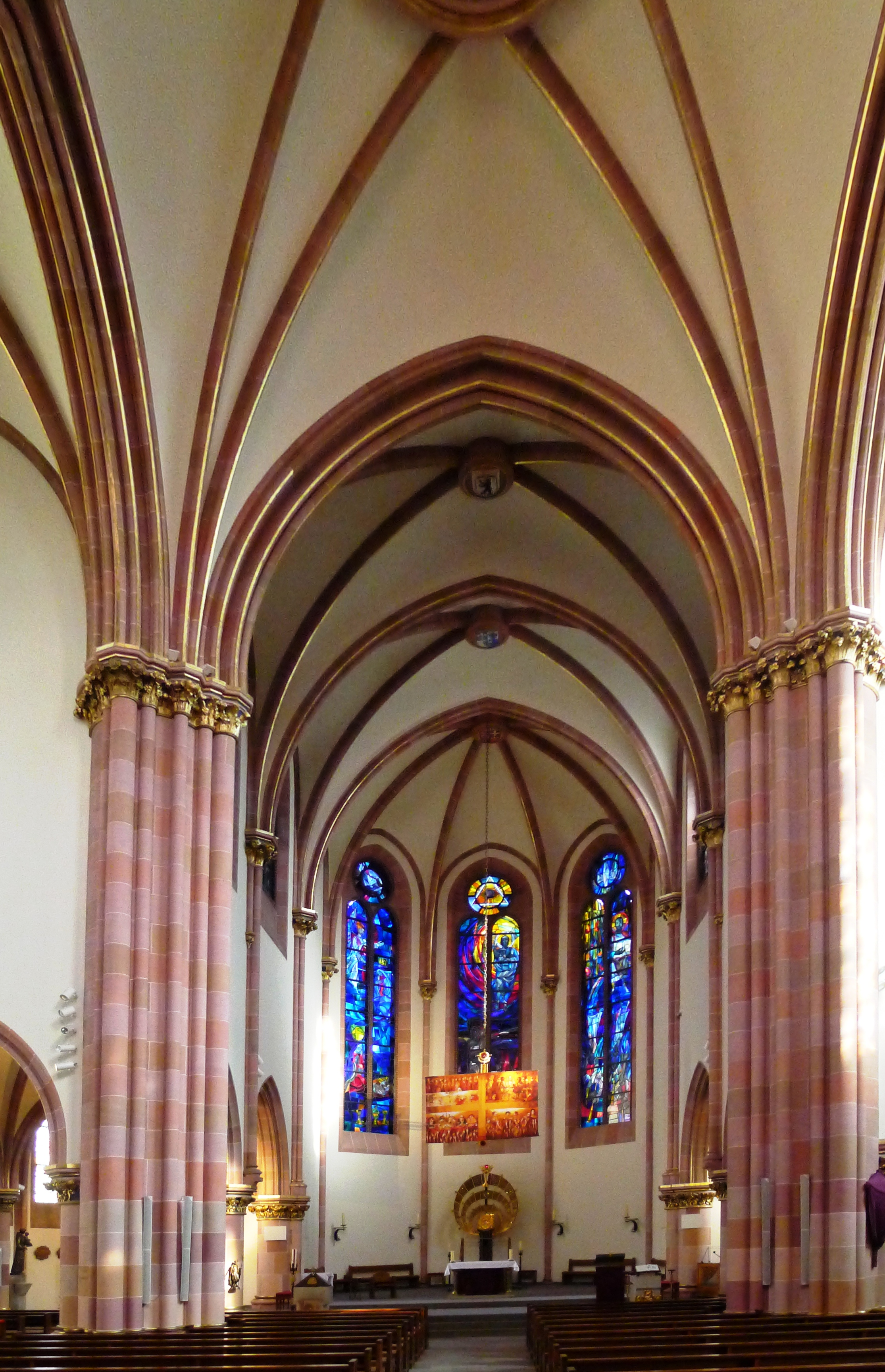 Altarraum von St. Ludwig